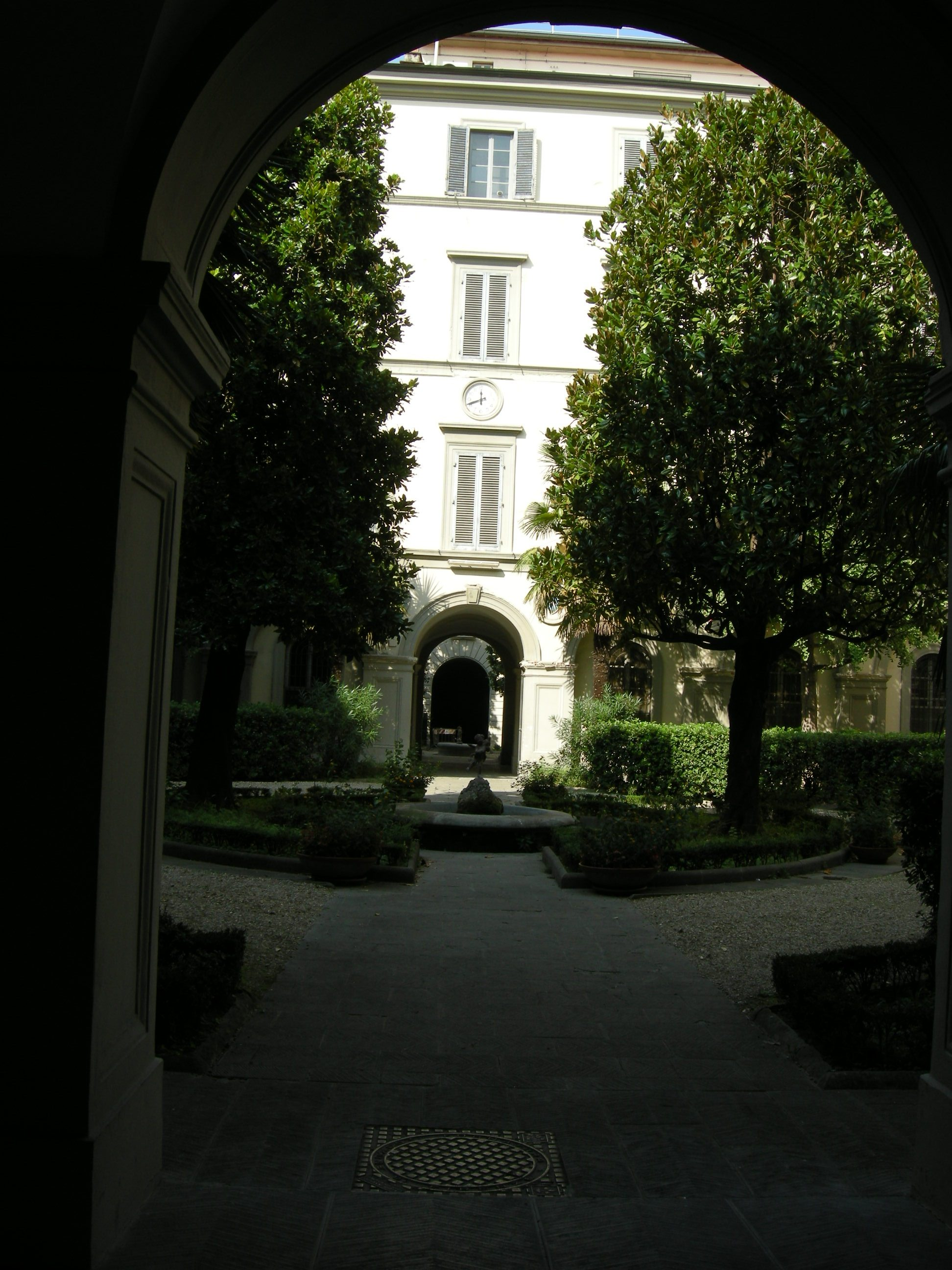 Ex convento di Santa Caterina, cortile